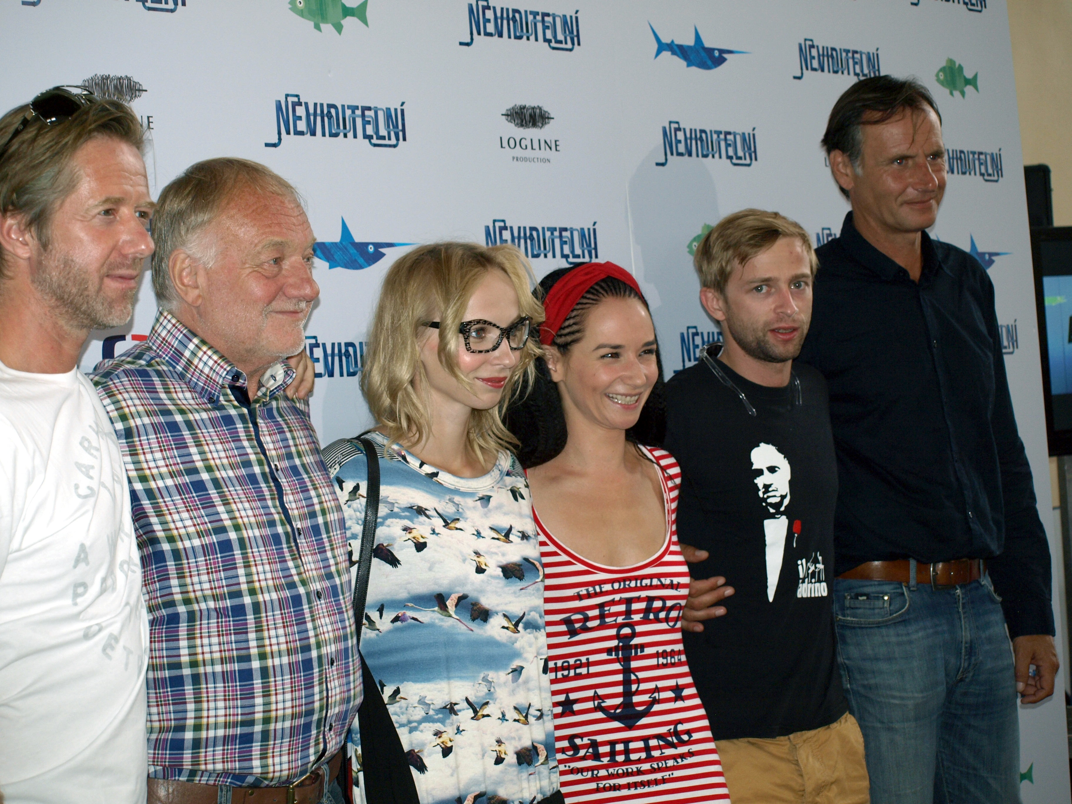 Fotky z novinářské konference z 24.7.2014- - Autor Blanka Borová pro & 10Mpix.cz